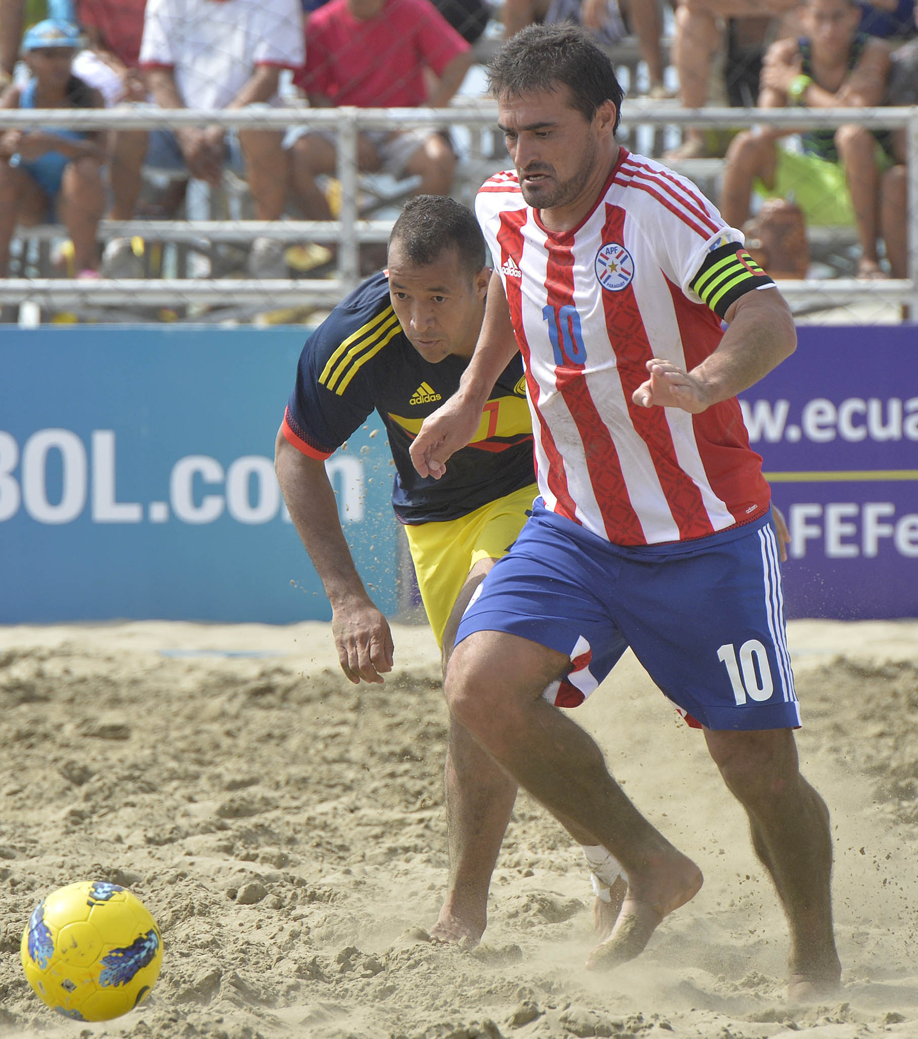 Manta, domingo 19 de abr (Andes).- Roberto "Toro" Acuña es una de las figuras de la selección paraguaya de fútbol playa, que disputa el Sudamericano de Ecuador 2015. Foto:César Muñoz/Andes